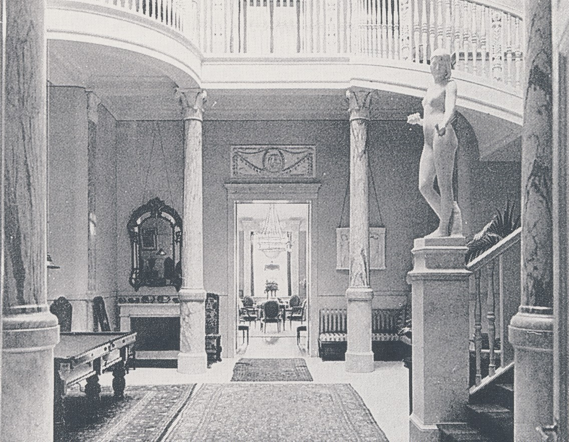 "Byströms villa" på Djurgården i Stockholm, interiör